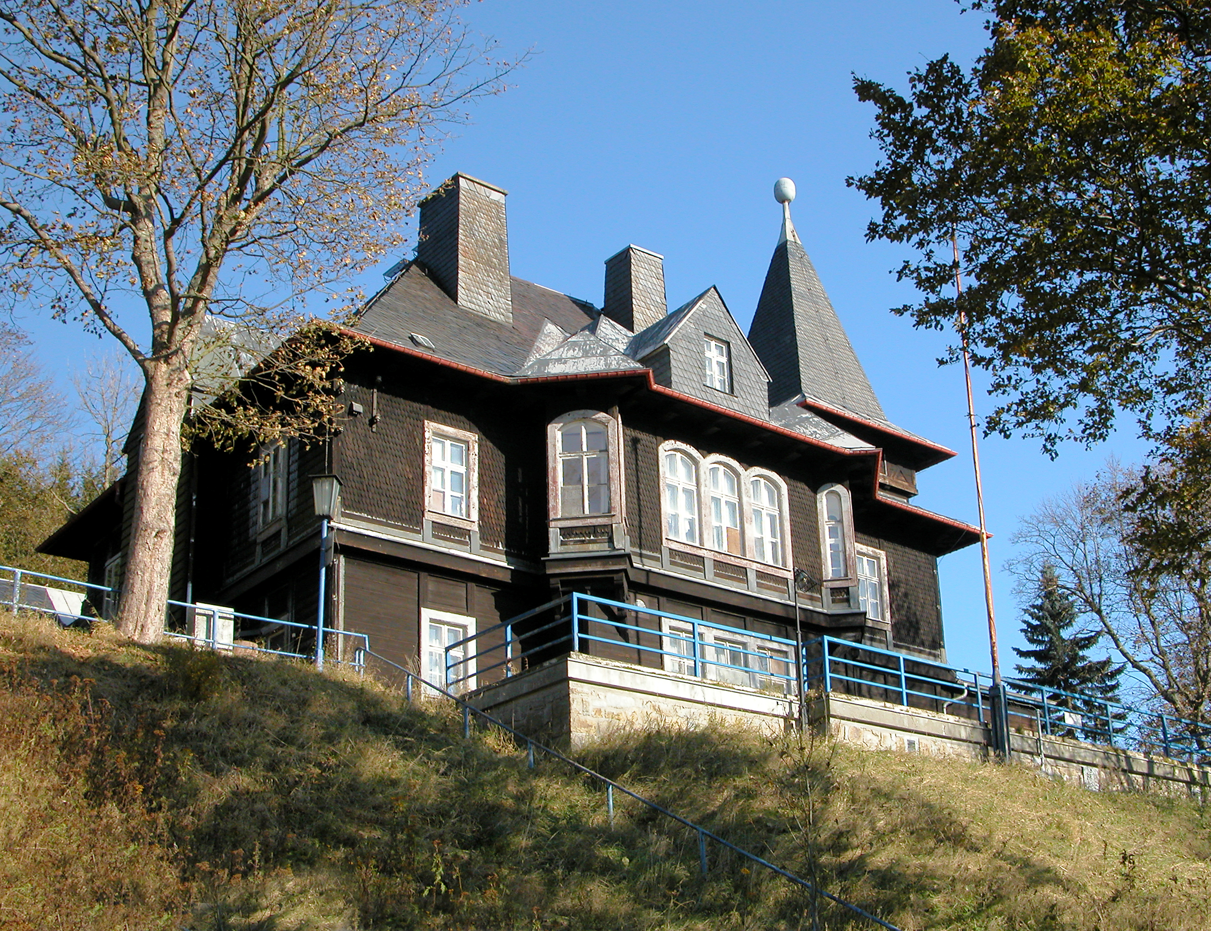 22.10.2011 01773 Rehefeld-Zaunhaus (Altenberg Sachs.): Jagdschloß Rehefeld, Talstraße 1 (GMP: 50.730679,13.701536). Die Schloßanlage war 1869 ein Geschenk der Kronprinzessin Carola von Sachsen an ihren Ehemann, den Kronprinzen Albert von Sachsen. Ab 1824 im Besitz der Dresdner Freimaurerloge, die sich 1933 gezwungen sah, das Jagdschloss an die Frontkämpferorganisation Stahlhelm zu verpachten. Ab 1935 als Pension im Besitz von Prinz Friedrich Christian von Sachsen. 1937 Umbau nach den Plänen des Architekten Ulrich und des Kunstmalers Heinrich Bickel zum Jagdhotel. Ab 1942 Reservelazarett der Wehrmacht. In der DDR-Zeit Ferienheim. Nach der Wende zunächst Fortbildungs- und Tagungsstätte der LandesPolizeischule Sachsen. 2012 privatisiert. Hier die Sicht von Süden. [DSCNn2949.TIF]20111022220DR.JPG(c)Blobelt